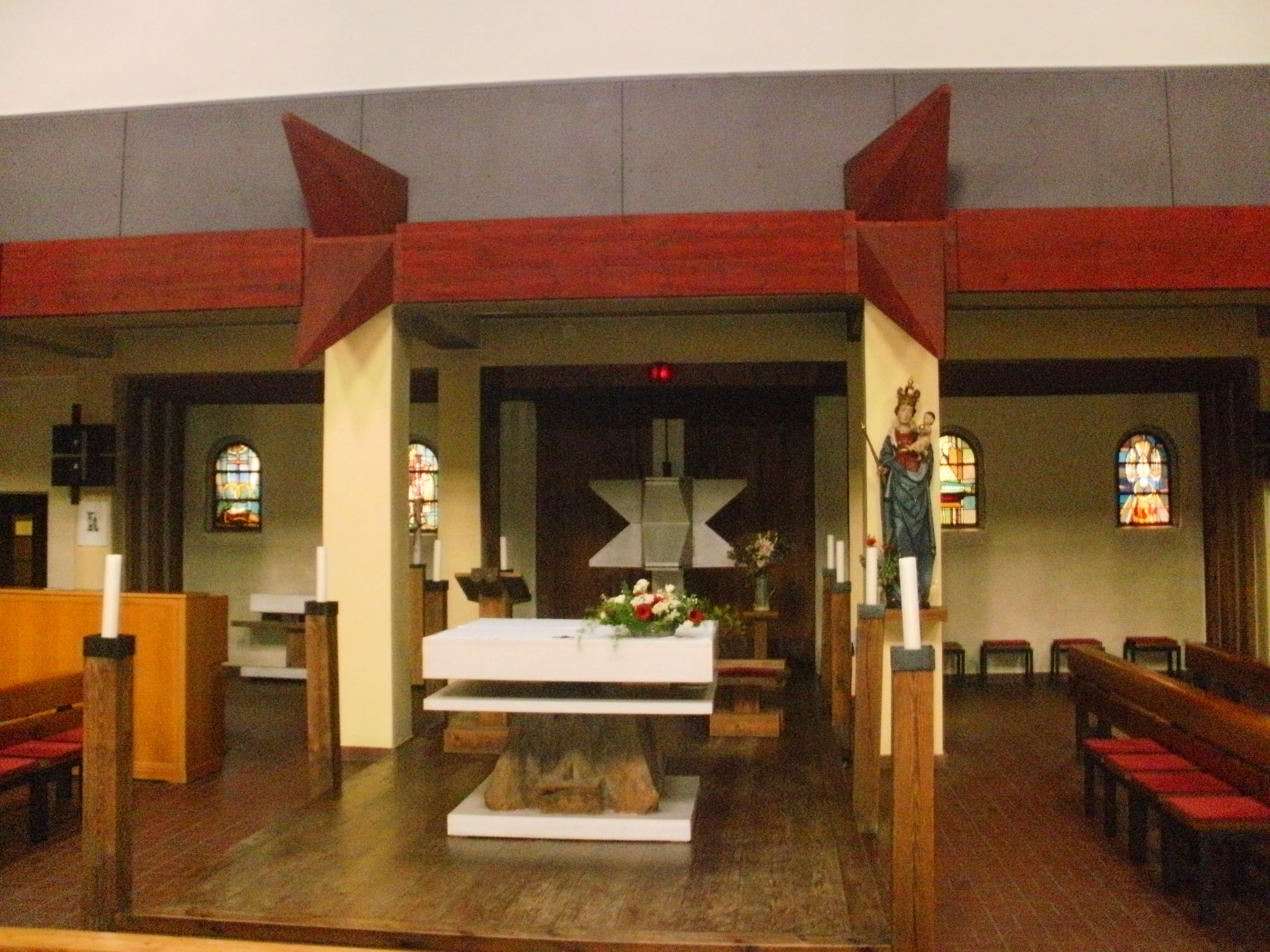 Innenraum der Marienkirche mit Altar, Dornenkranz und spätgotischer Madonna auf der Mondsichel